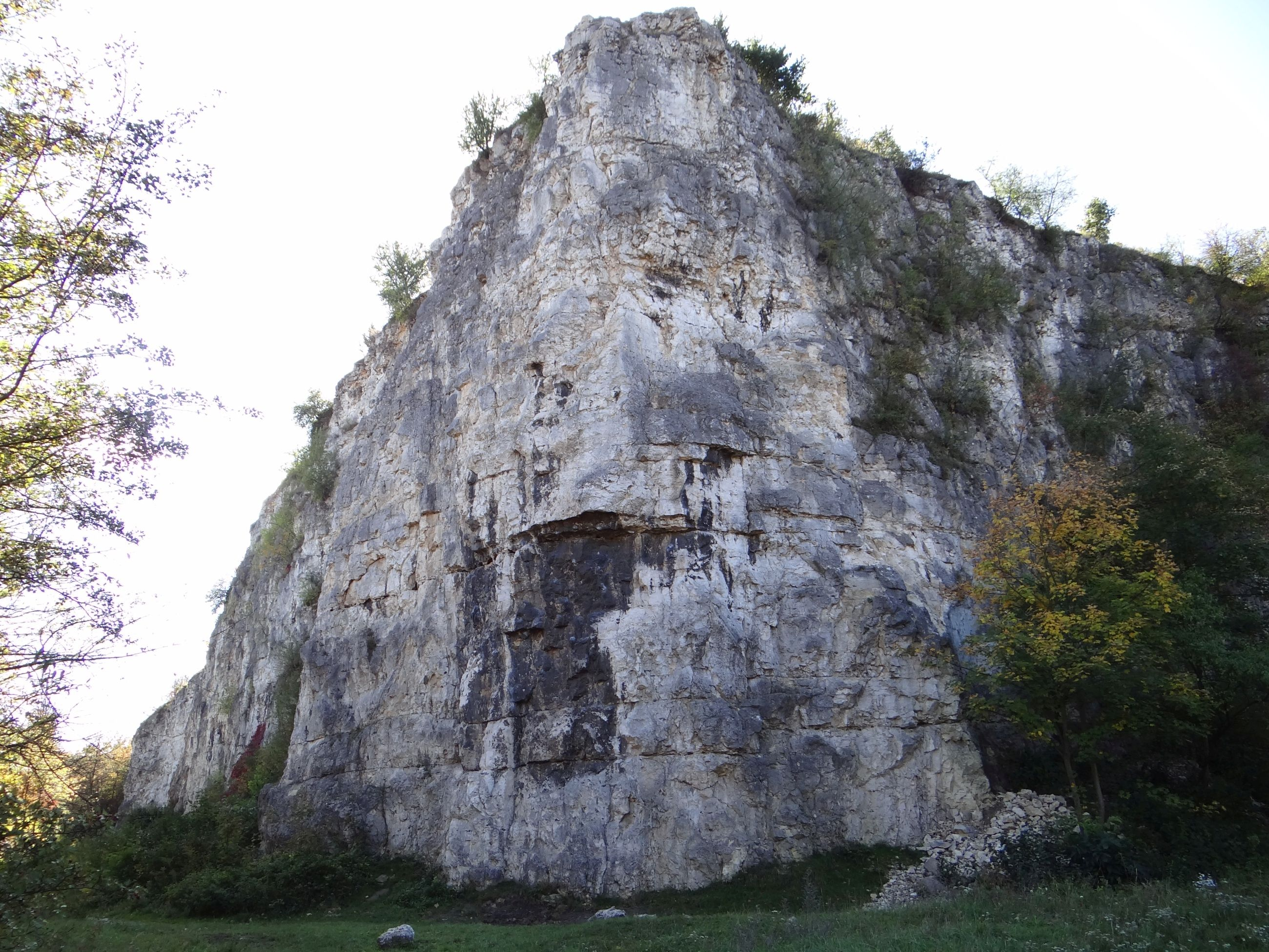 Baba Jaga na Zakrzówku w Krakowie